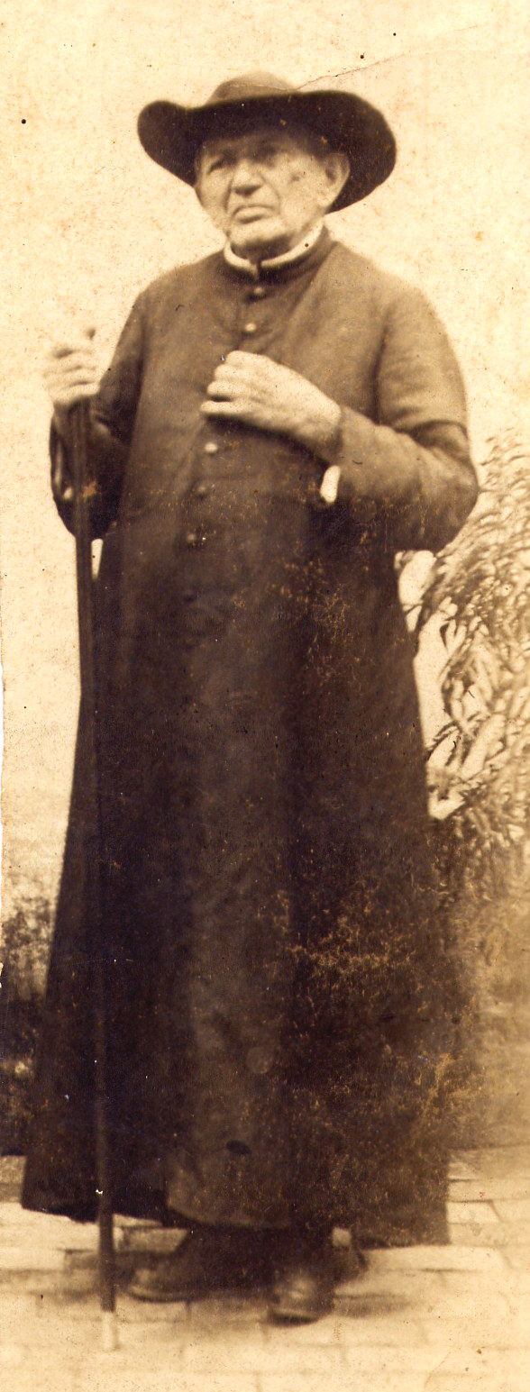 Padre Cícero com cerca de oitenta anos.